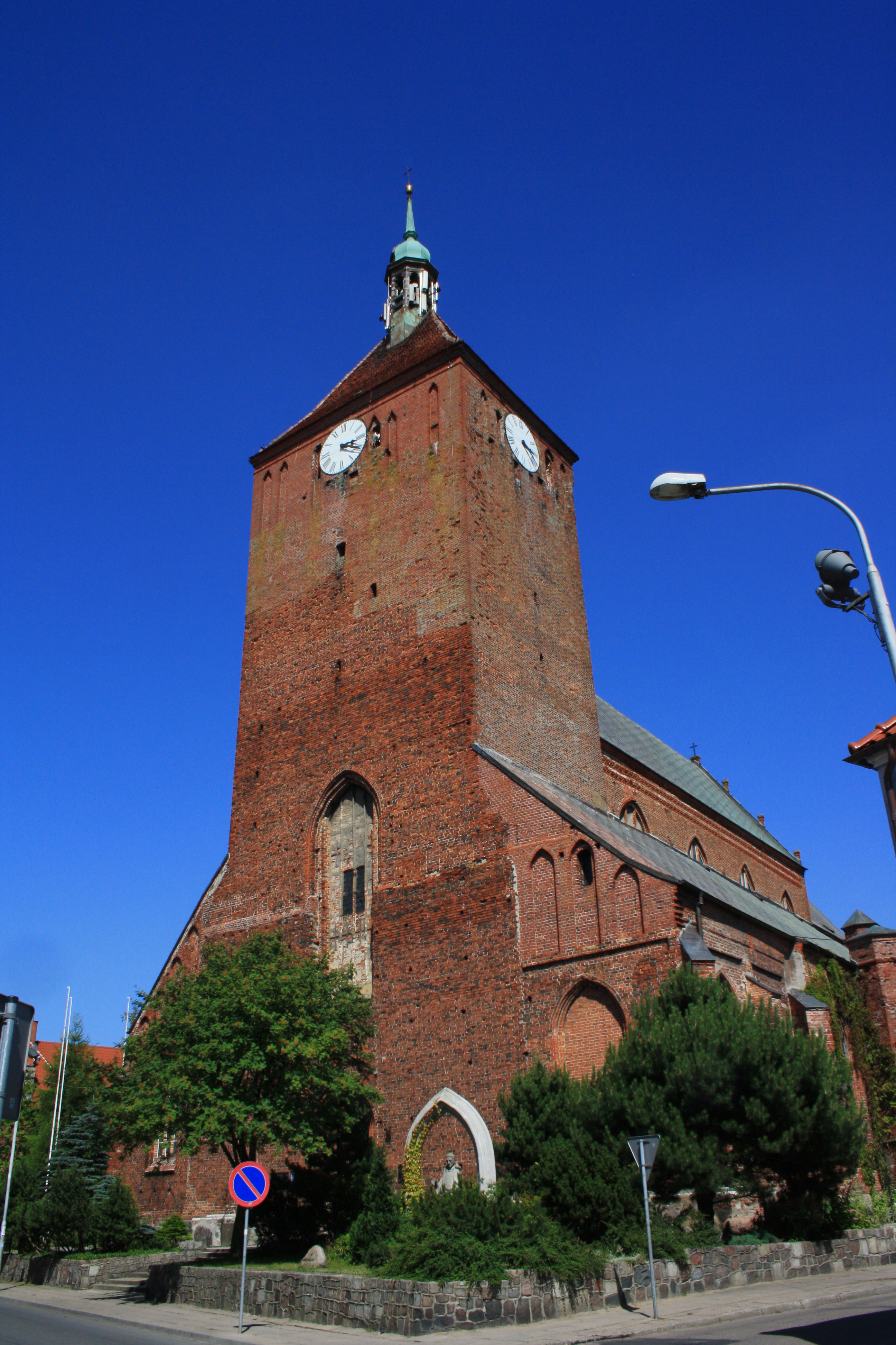 Budynek kościoła MB Częstochowskiej w Darłowie